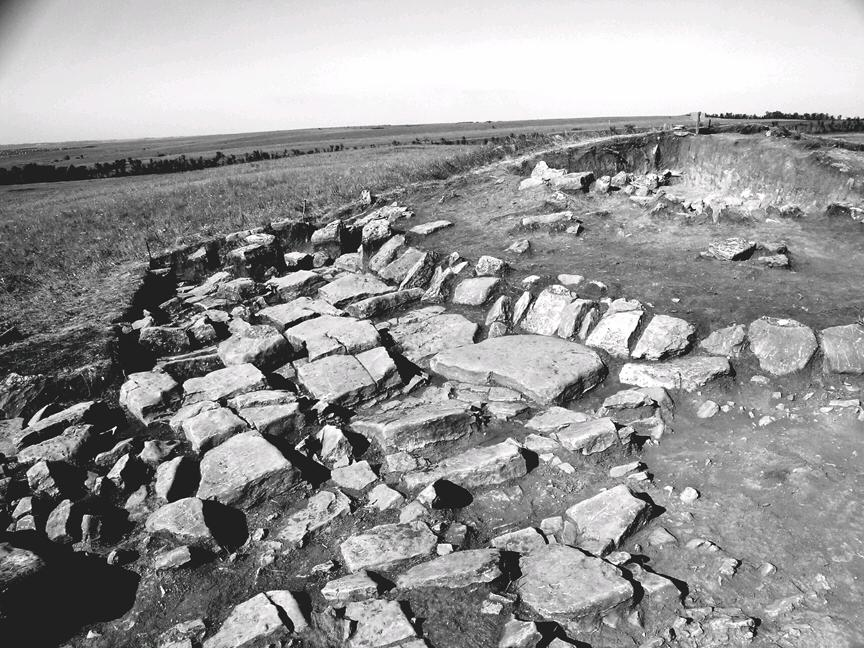 Степанівський комплекс: Фото